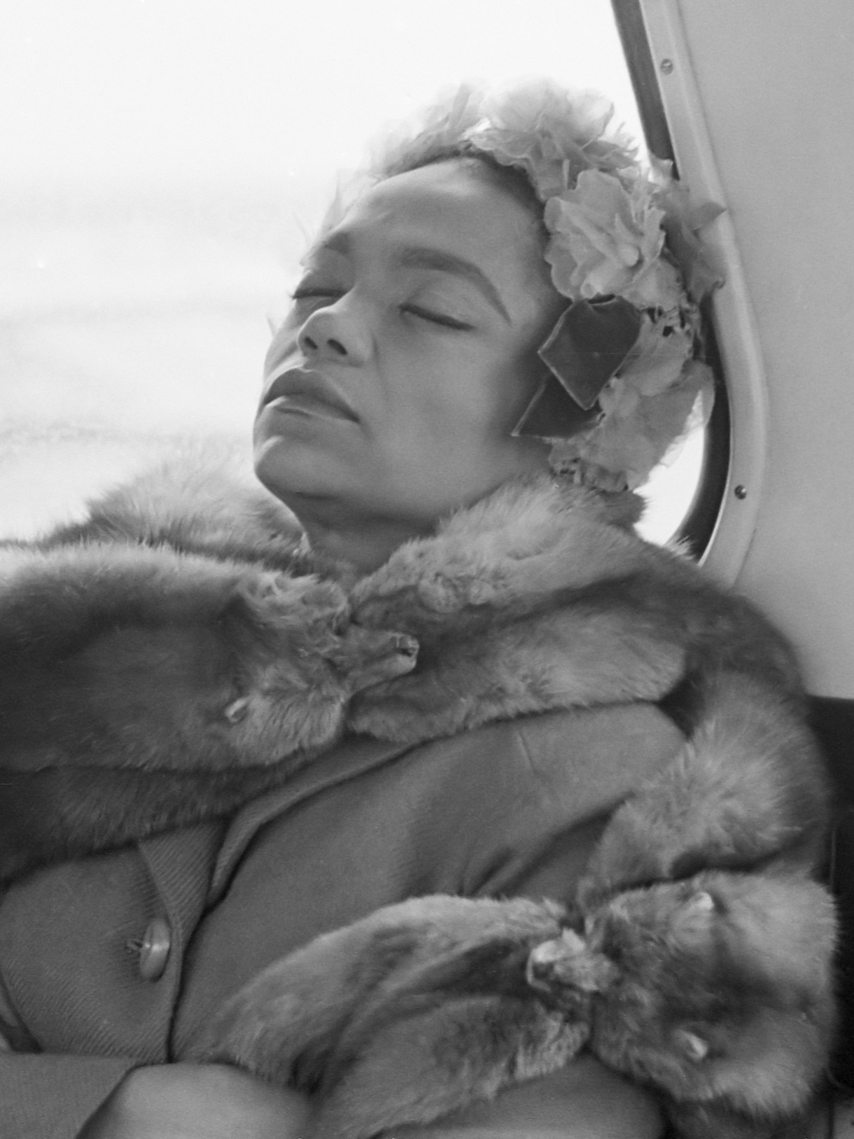 Eartha Kit slapende in de bus 5 mei 1962